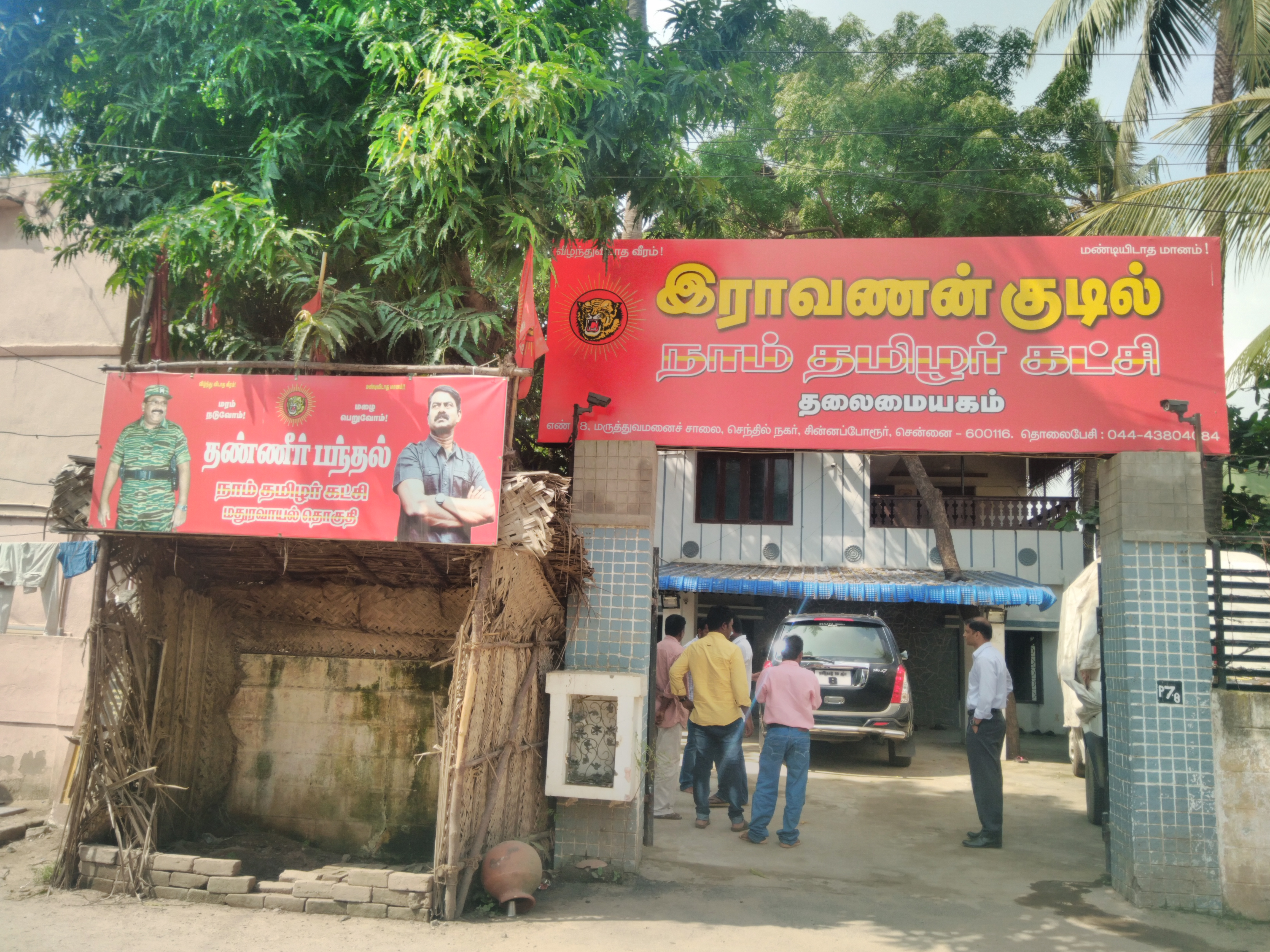 நாம் தமிழர் கட்சியின் அலுவலக முகப்பு, சென்னை.